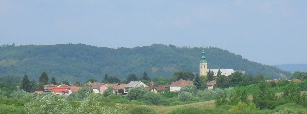 Ipolyvarbó - a község látképe Őrhalomról nézve